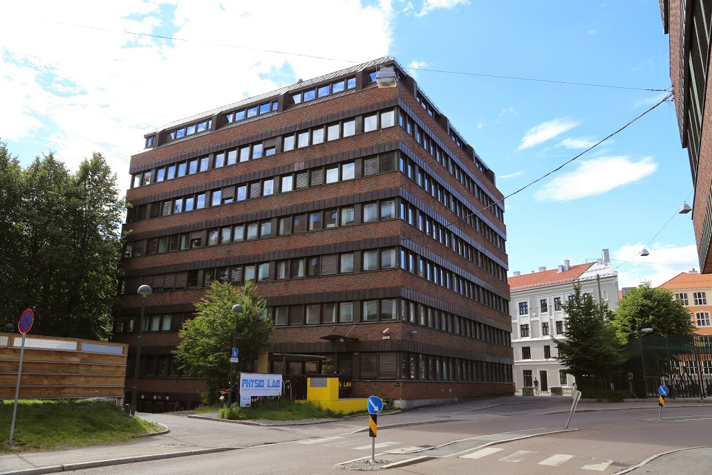 Kolstadgata 1 i Oslo. Kontorbygning oppført for Universitetsforlaget i 1980. Arkitektene Jan Digerud og Jon Lundberg sto for innredningen og fikk Houens fonds diplom i 1982 for dette.